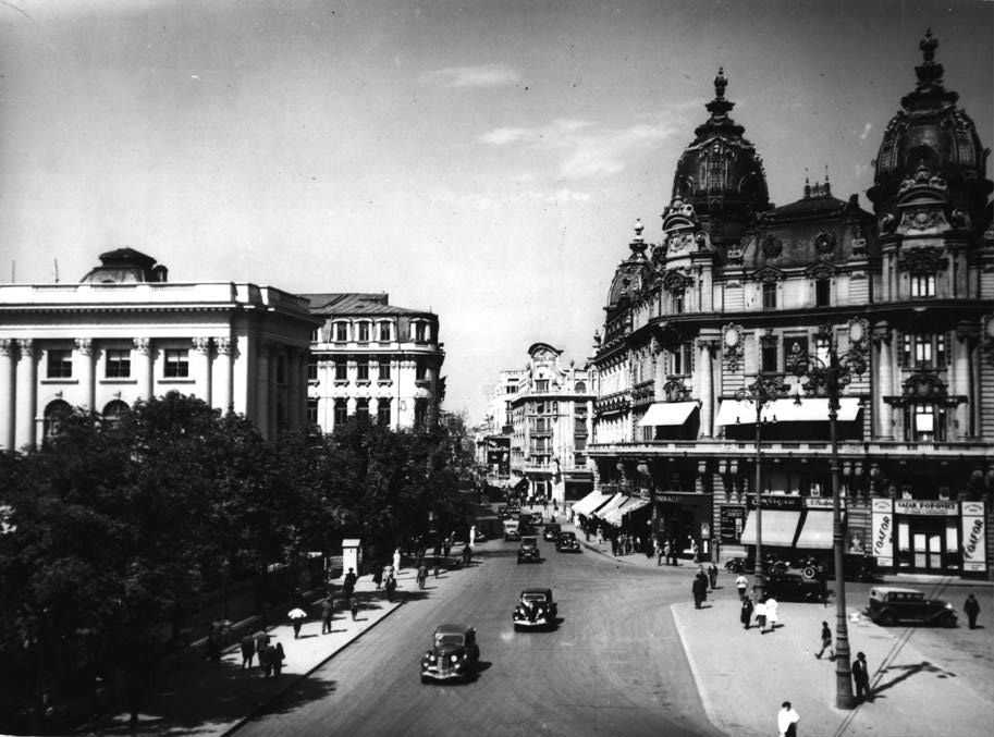 Nicolae Ionescu; Piaţa Palatului ; 1935; 180x240mm; Prov.Col.N.Ionescu.B.A.R.inv.159197. În dreapta, clădirea Auto Clubului şi Cafeul Corso, în stinga în spatele palatului, Hotelul Imperial şi Cafeul Imperial.